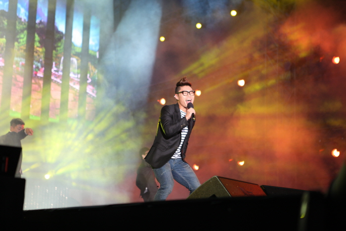 가수 김범수